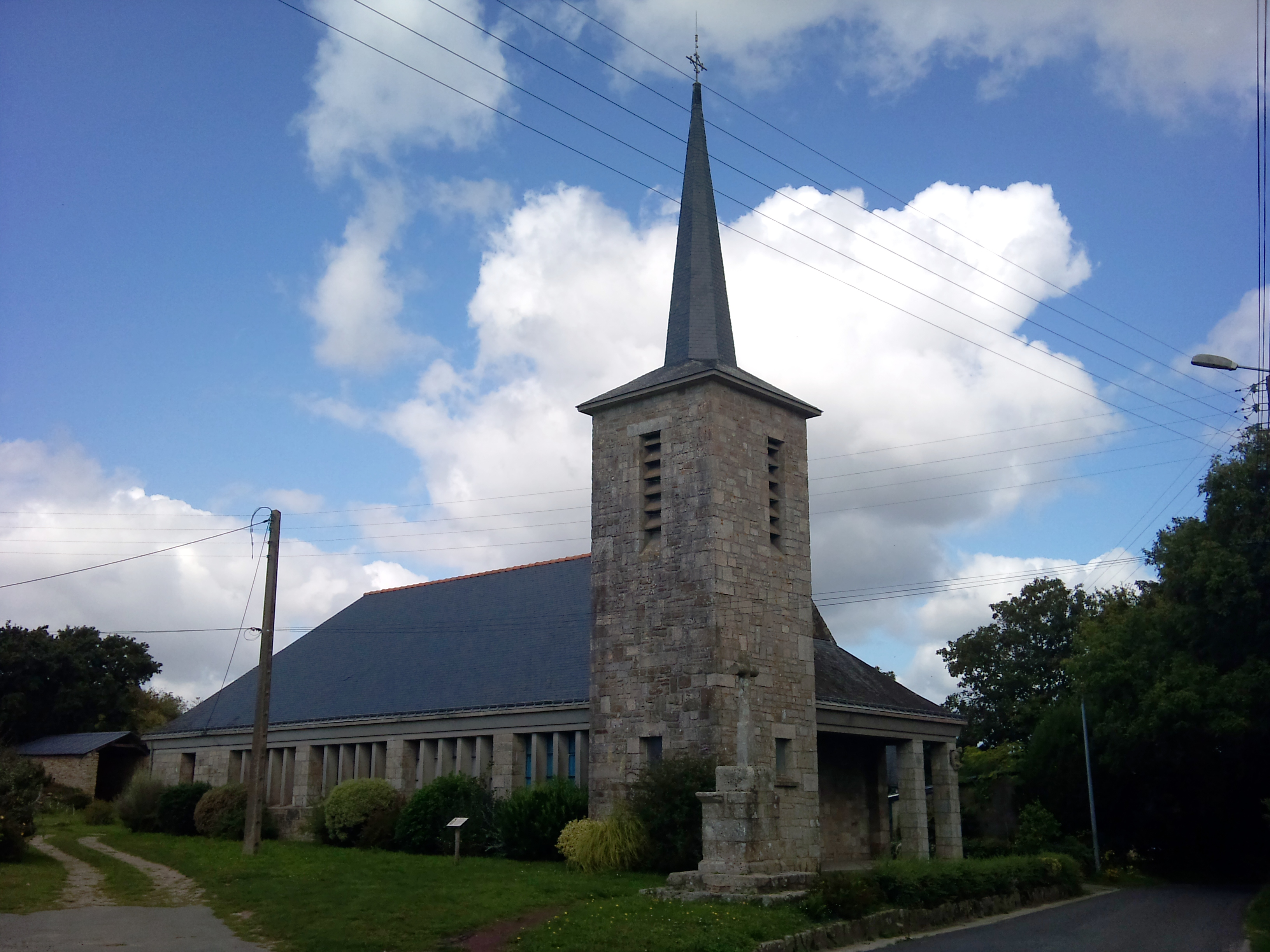 Chapelle de la Trinité de Quéven, telle que reconstruite entre 1960 et 1962 après les bombardements alliés de 1944. Le monument détruit datait d'entre le XVIe et le XIXe siècle. Quelques fragments sont conservés sur place (bénitier du XVIe, personnage et inscription de 1771, fontaine du XIXe). La croix monumentale de 1657 est ici au premier plan (mais le croisillon date de la fin du XIXe siècle). On aperçoit le personnage, et aussi l'inscription de 1771, traces de l'ancienne chapelle, sur les deux colonnes en façade, à droite de l'image.